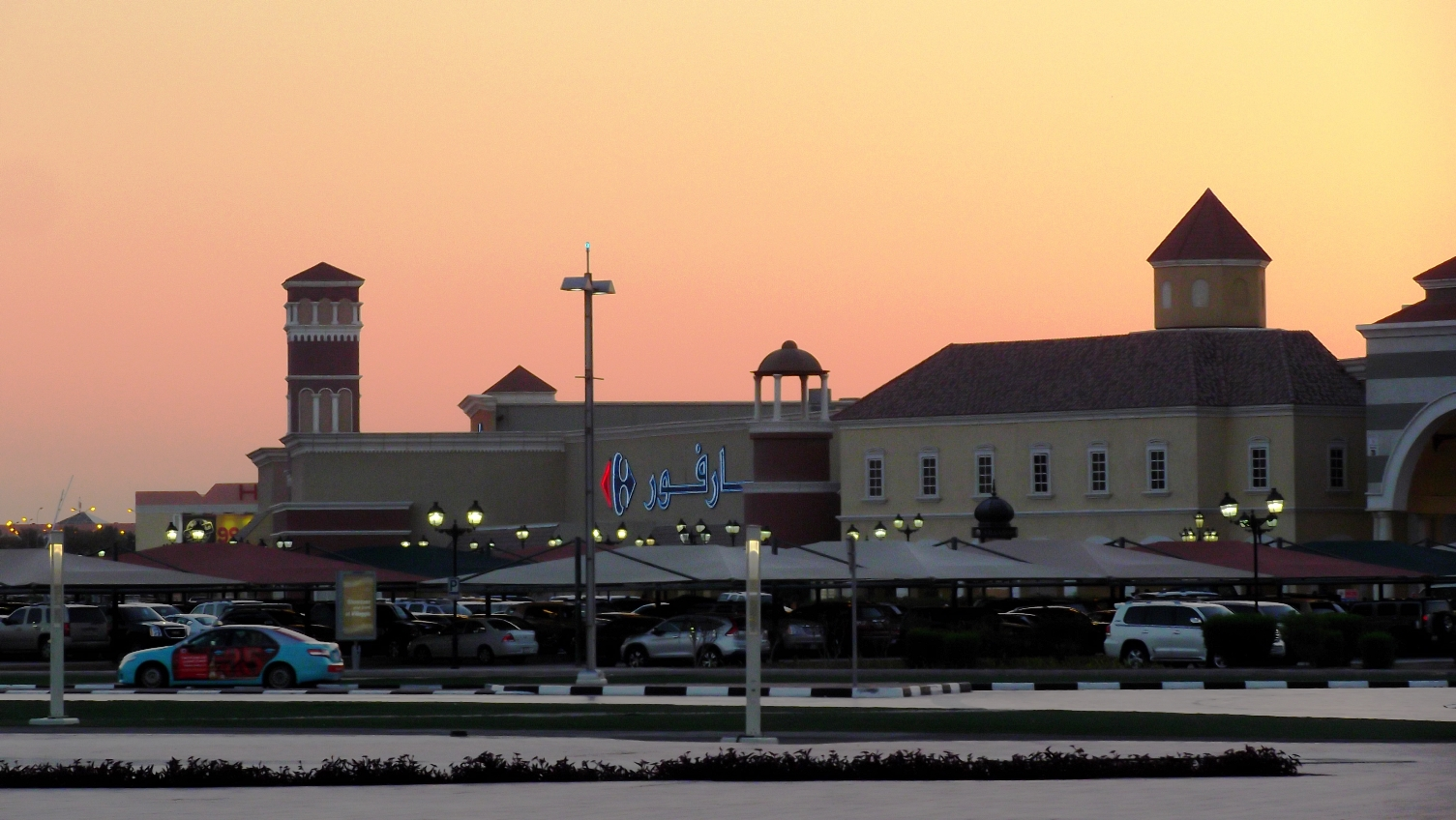 Villagio Mall, Aspire Park, Doha